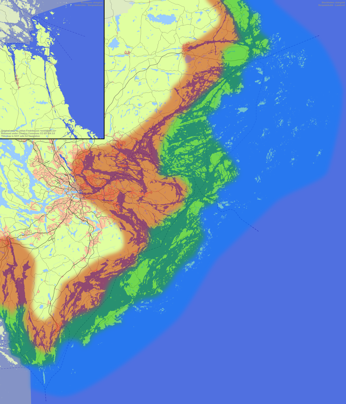 Stockholms skärgårds indelning i inner-, mellan- och ytter-skärgård.